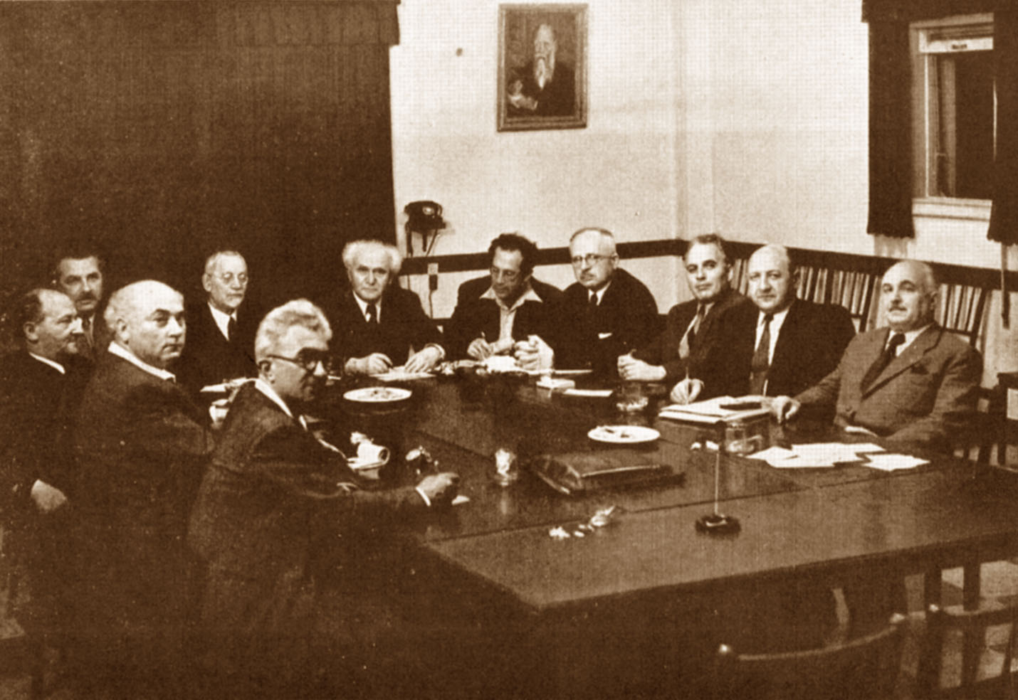 he:מינהלת העם בישיבה. סביב השולחן, מימין לשמאל: he:דוד רמז, he:אליעזר קפלן, he:בכור שלום שטרית, he:פנחס רוזן, המזכיר, he:דוד בן-גוריון, הרב he:יהודה לייב מימון, he:משה חיים שפירא, he:פרץ ברנשטיין, he:אהרון ציזלינג, he:מרדכי בנטוב.